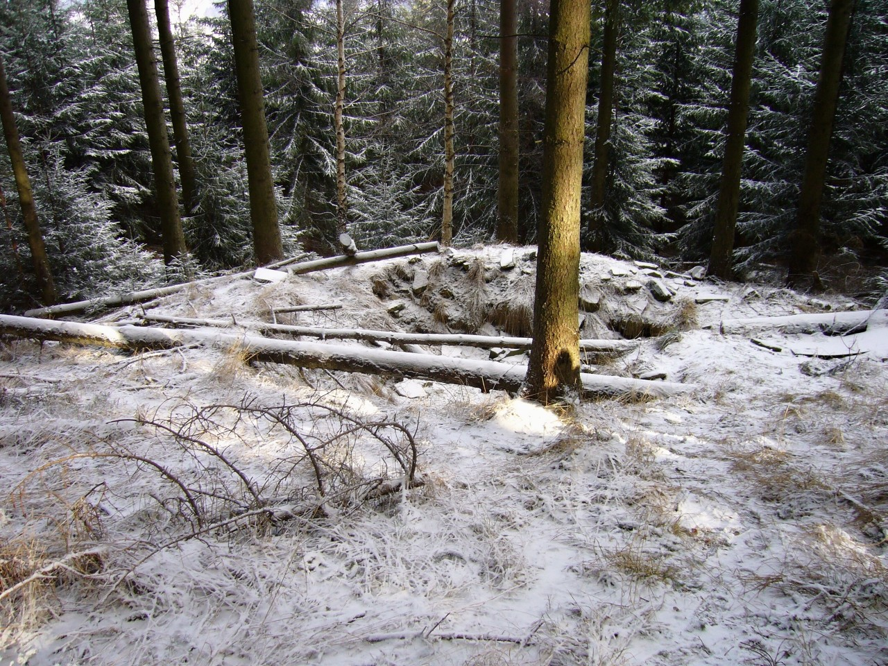 partyzánský bunkr